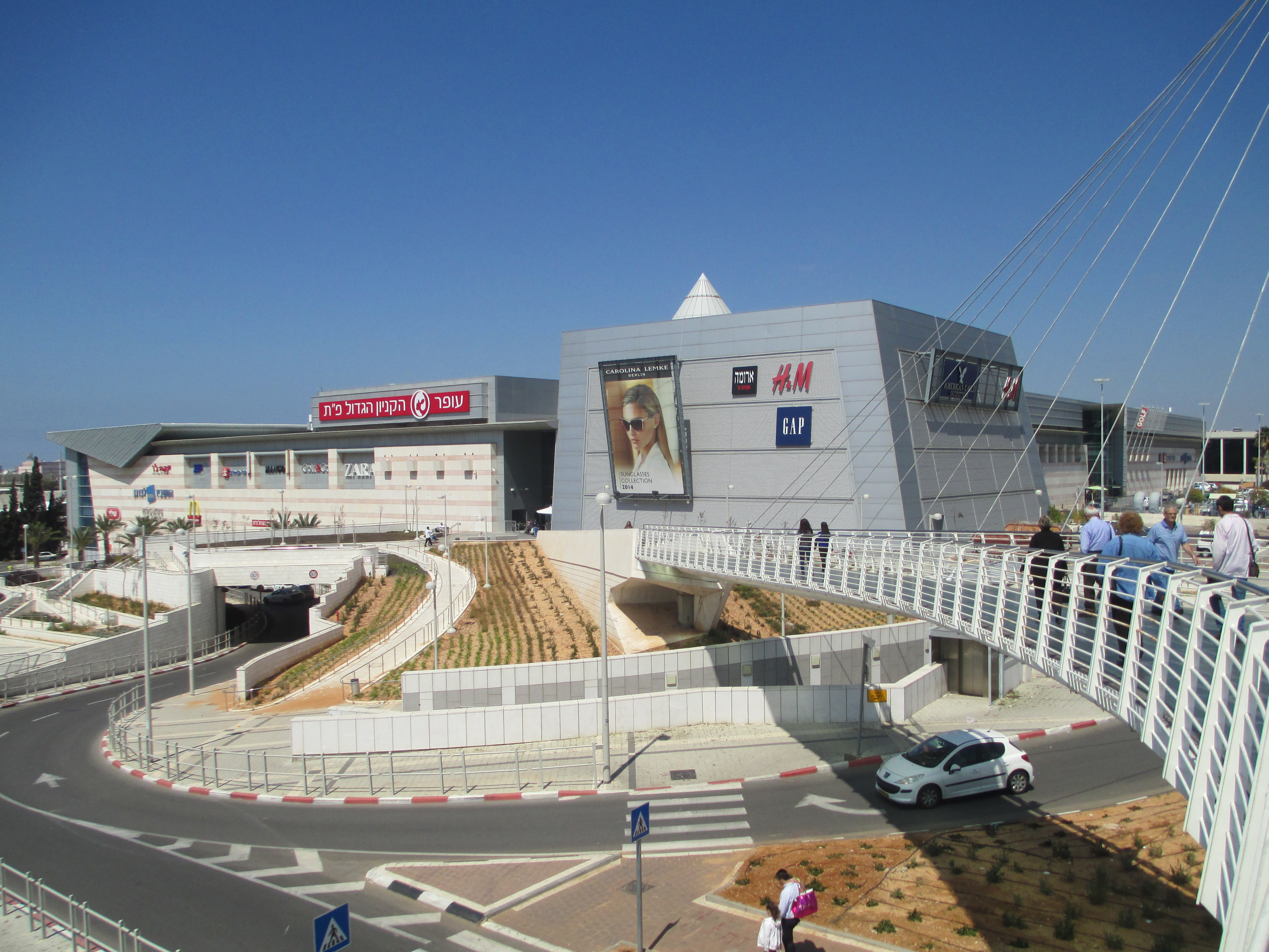 הקניון הגדול בפתח תקווה